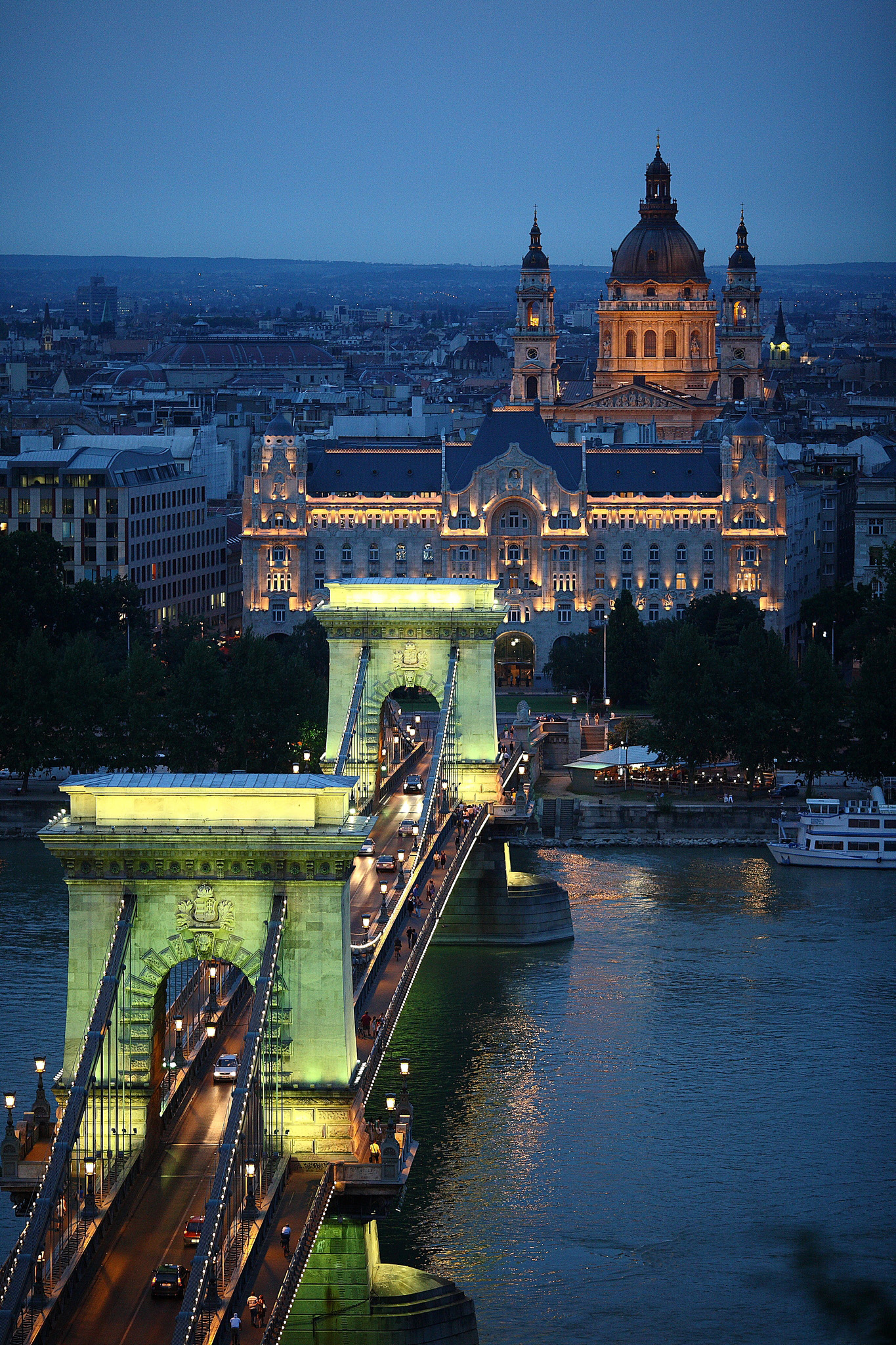 Inquadrato dal palazzo reale. Canon 5D + 135L 1/100s f/2 (sì, proprio f/2 - il 135 è disumano in queste cose) 800ISO mano libera